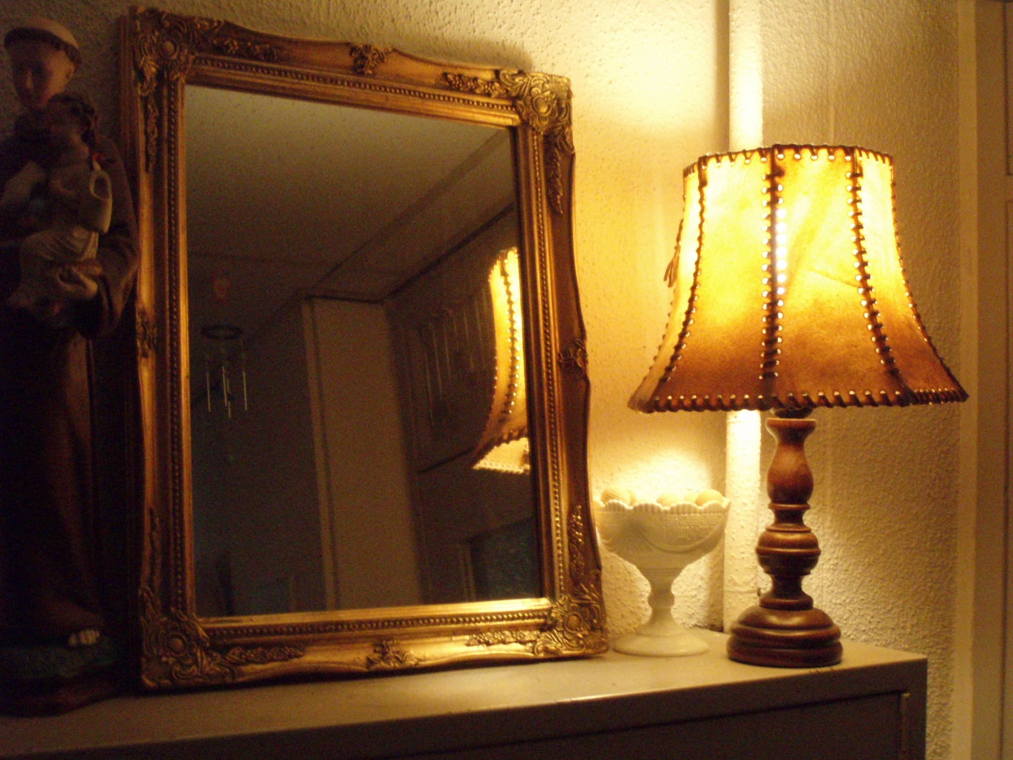 Schemerlamp en de zichtbaarheid van beperkte lichtverspreiding